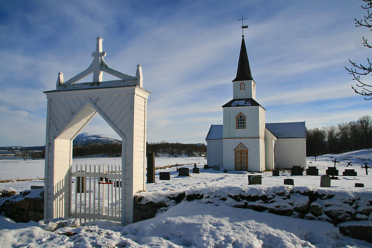 Holzkirche auf der norwegischen Insel Tranoey, Senja